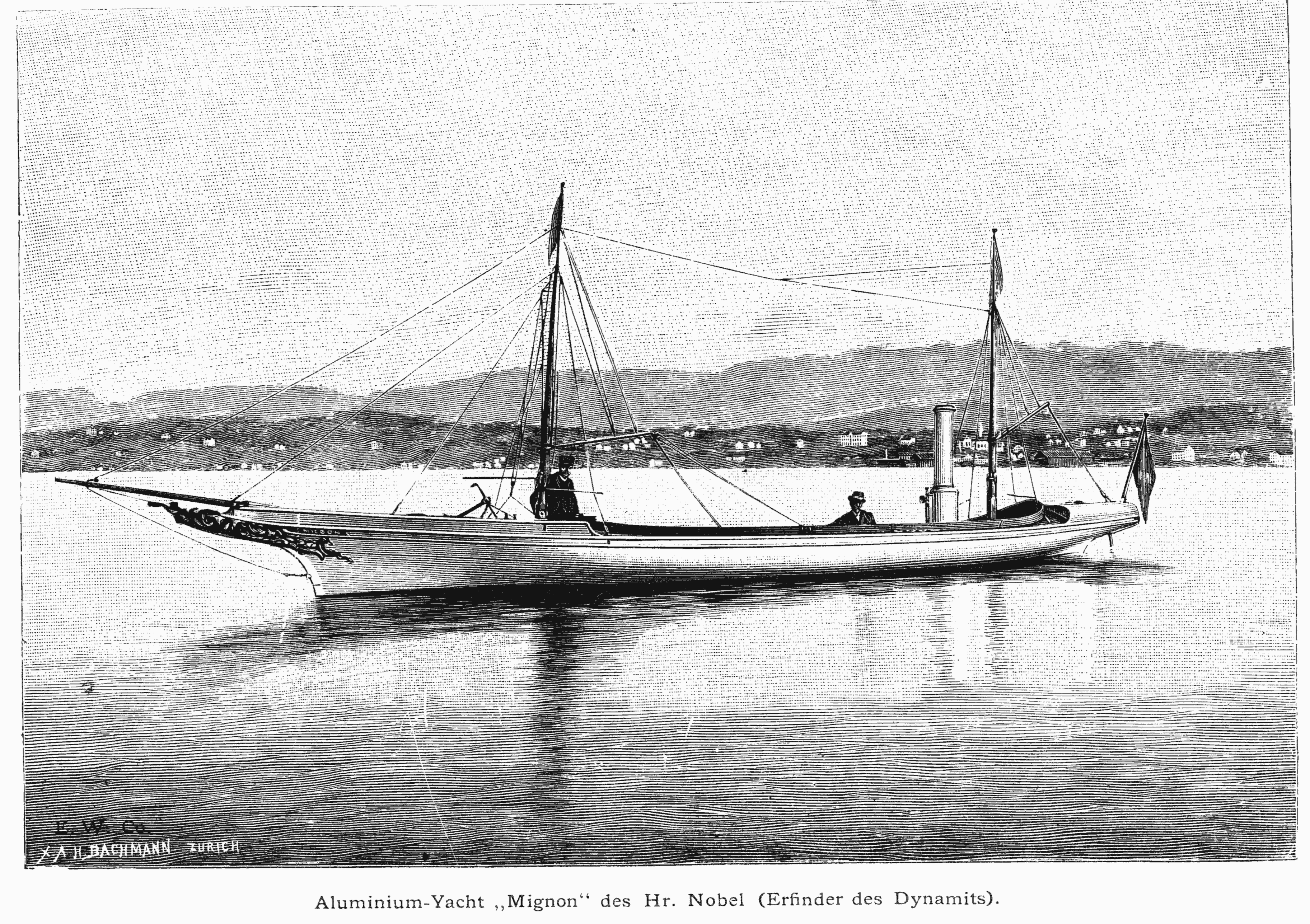 Aluminium-Yacht "Mignon" des Hr. Nobel (Erfinder des Dynamits).